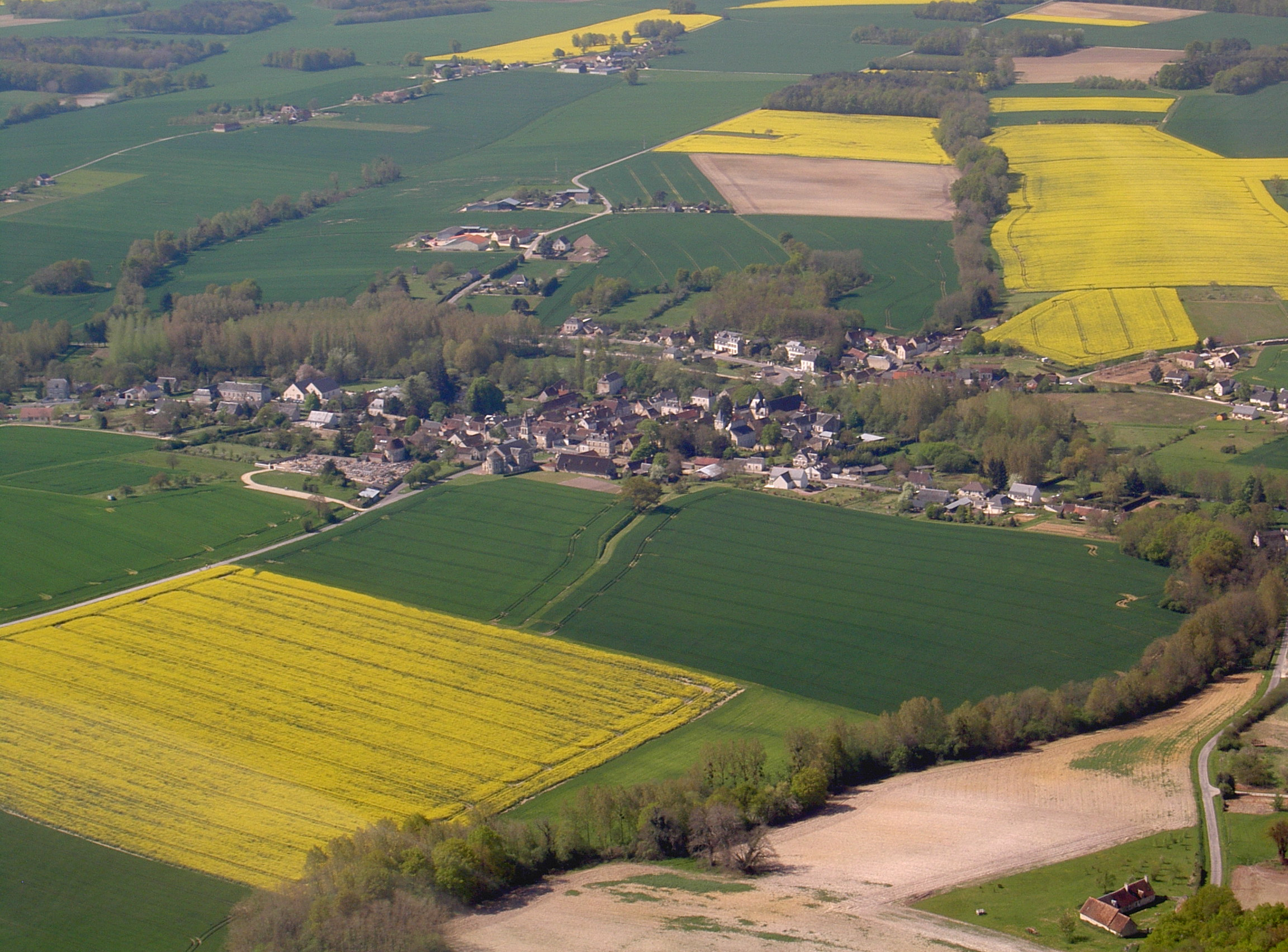 Vue aérienne de Villeloin-Coulangé